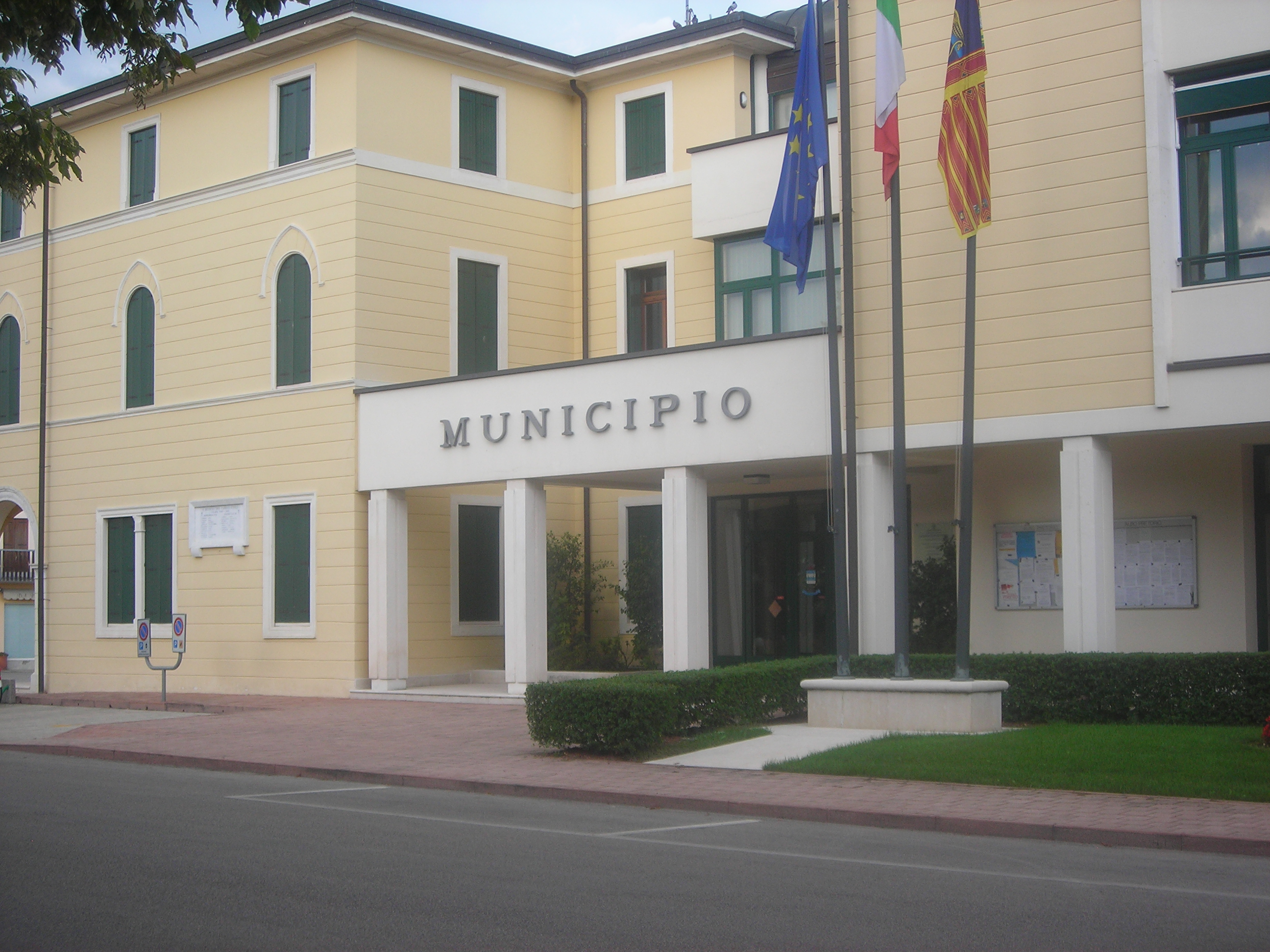 foto del Municipio di Costabissara